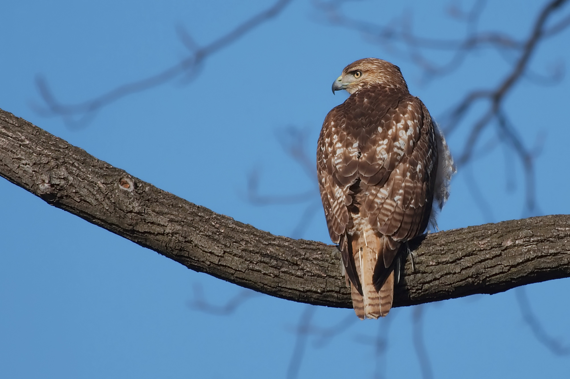 A red-tail hawk (Buteo jamaicensis), taken in Urbana, IL